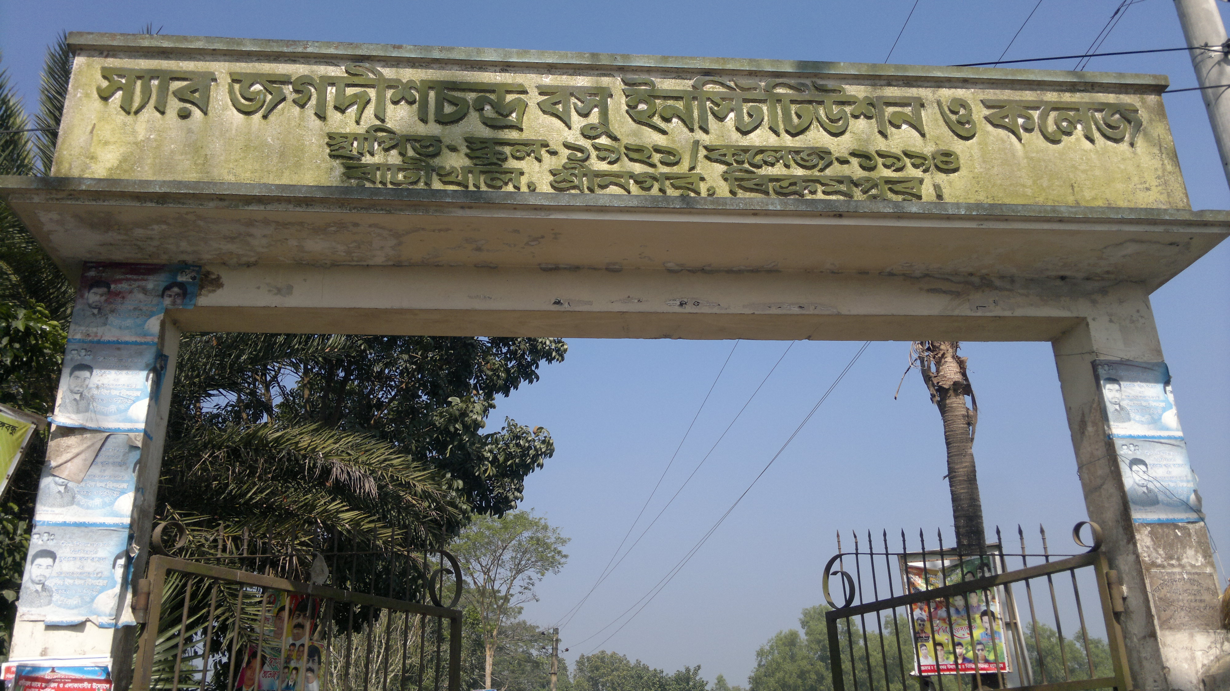 স্যার জগদীশ চন্দ্র বসুর বাড়ী